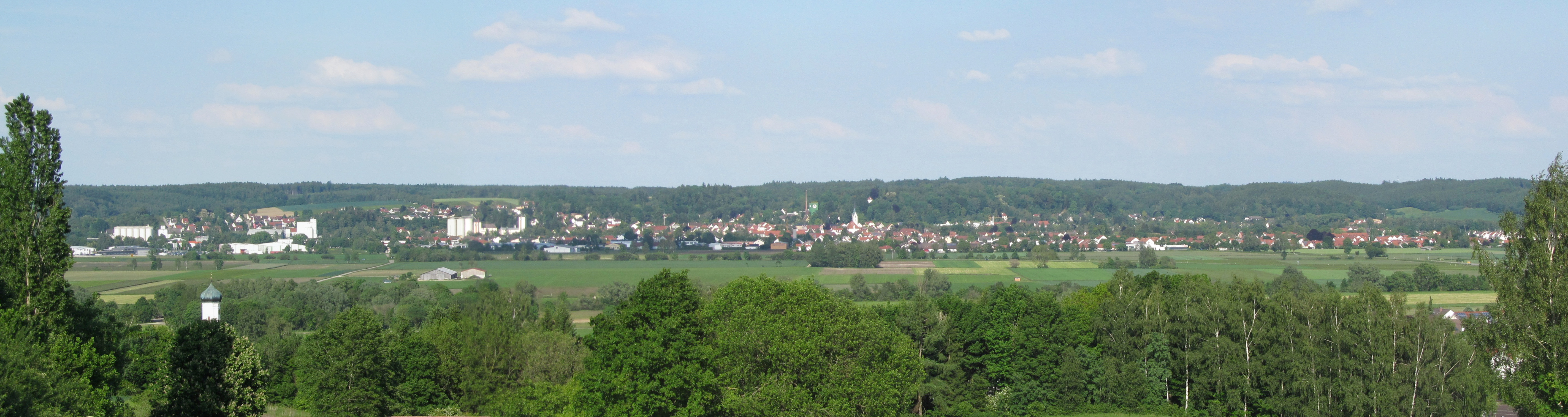 Panorama von Thannhausen (Schwaben).